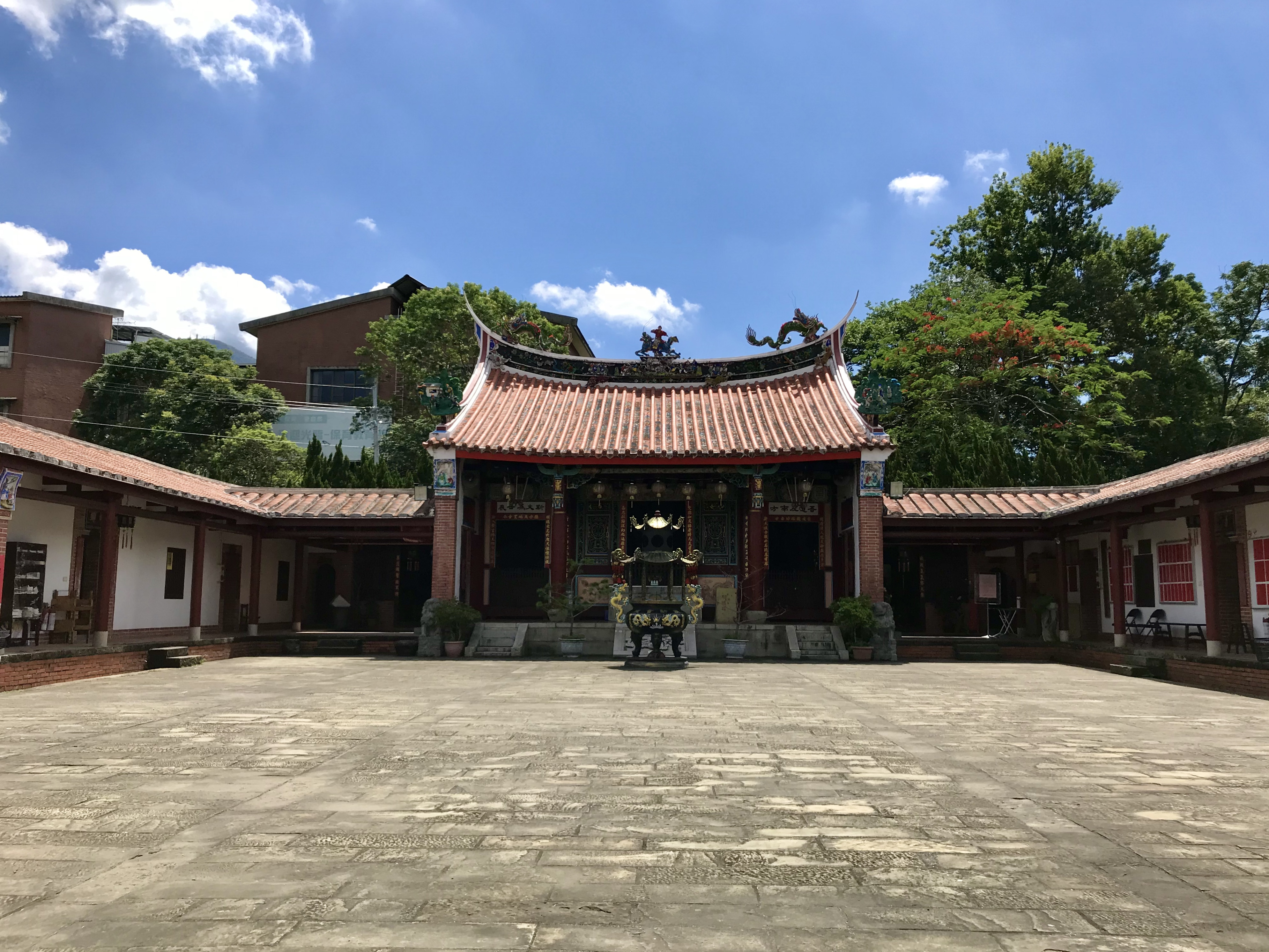 中文（台灣）: 明新書院主殿